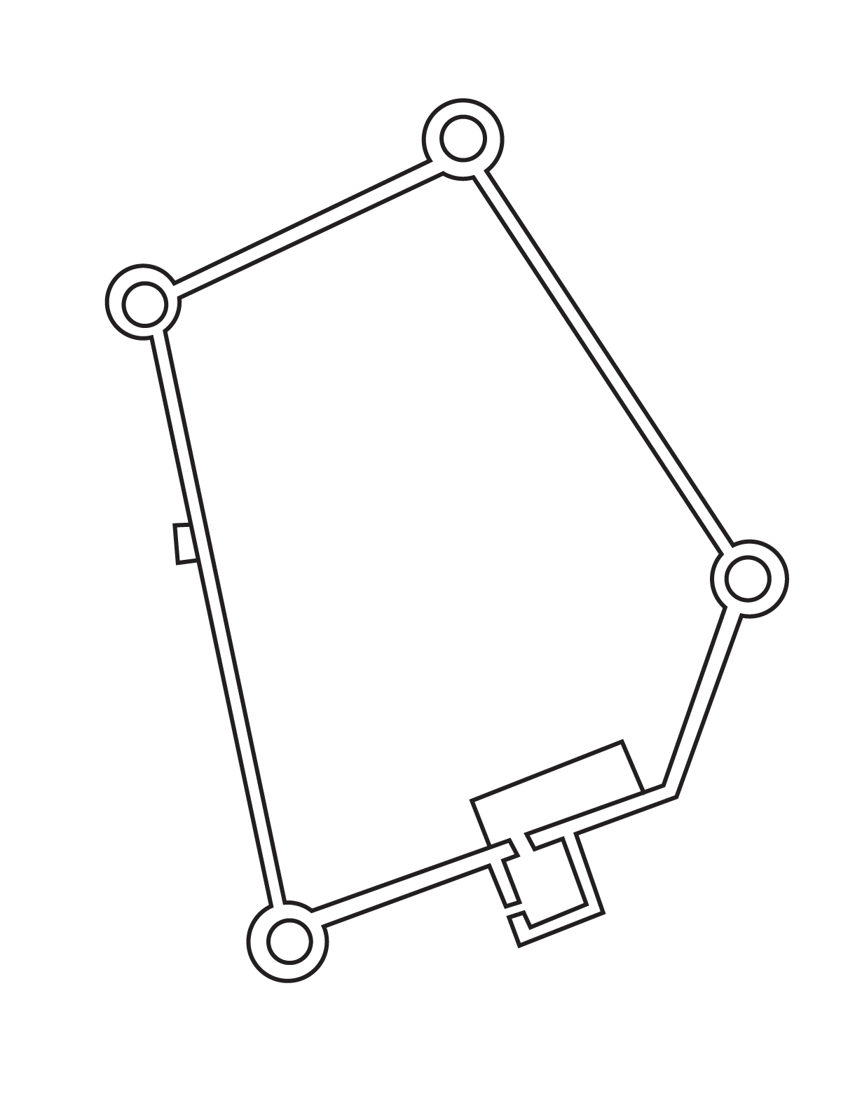 Planimetria e Kalasë së Prezës, Shqipëri